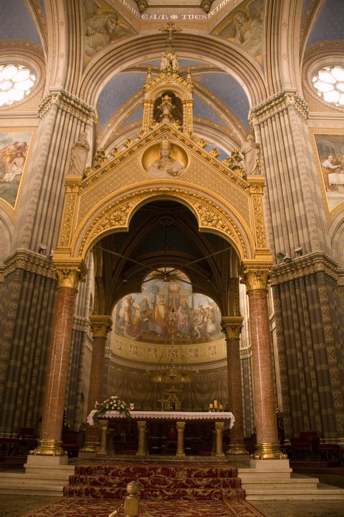 Đakovačka katedrala